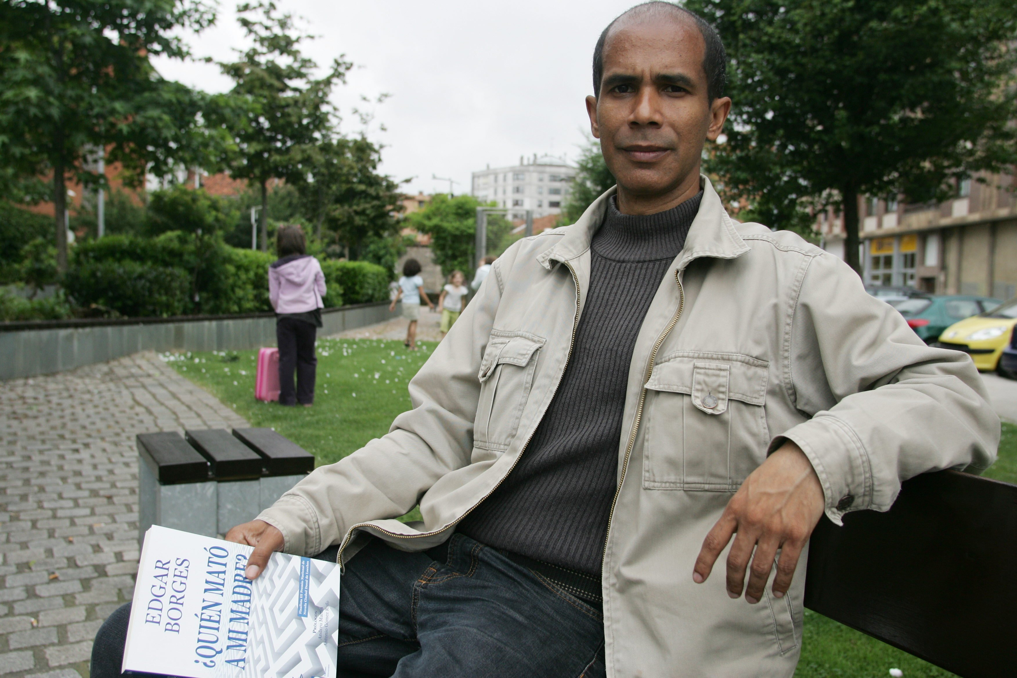 Escritor venezolano Edgar Borges (Caracas, 1966)